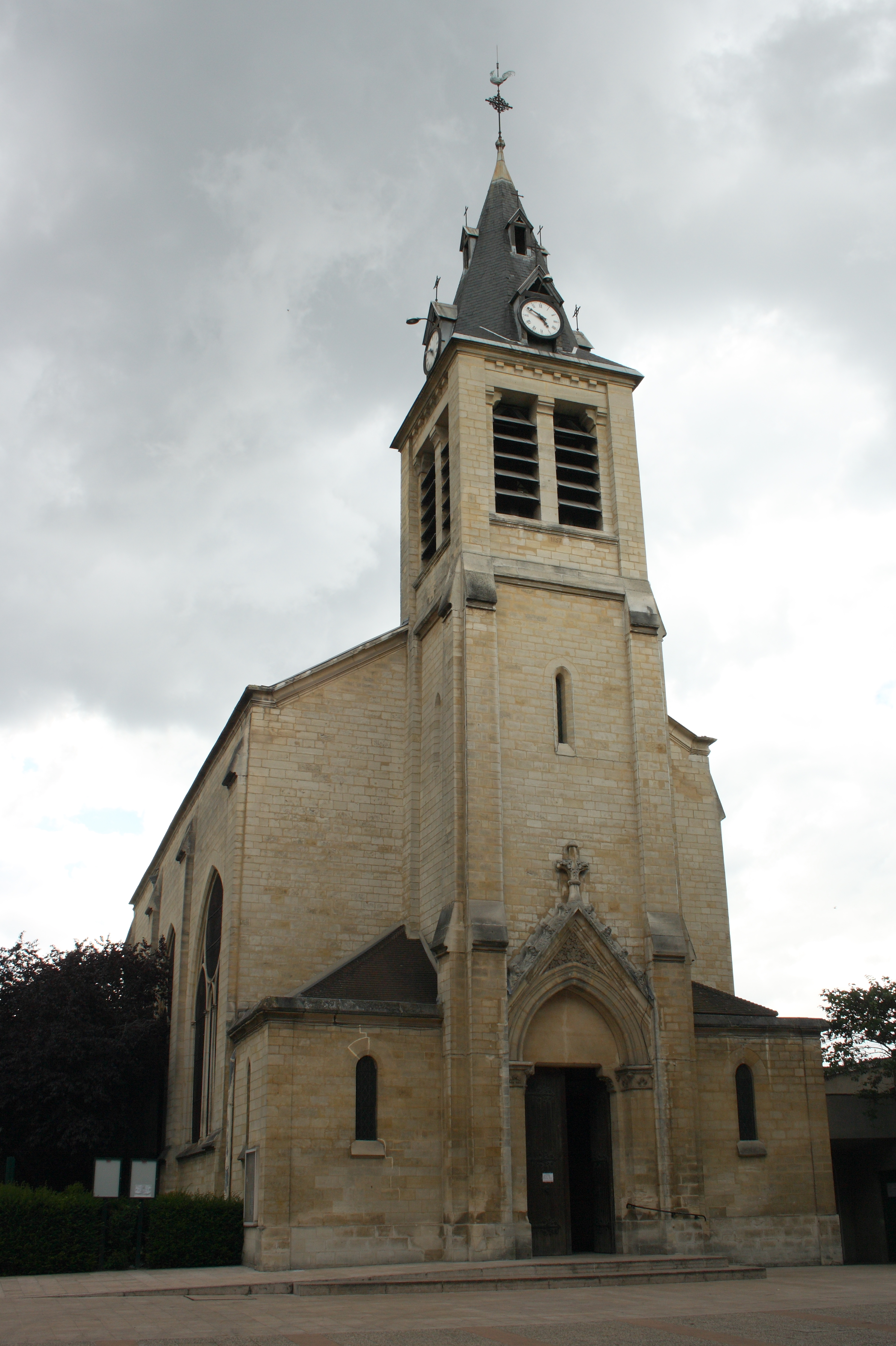 Katholische Kirche Saint-Gratien in Saint-Gratien im Département Val-d’Oise in der Region Île-de-France (Frankreich), Eingangsfassade und Glockenturm